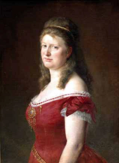 Bildnis Marie Geistinger (1828–1903)